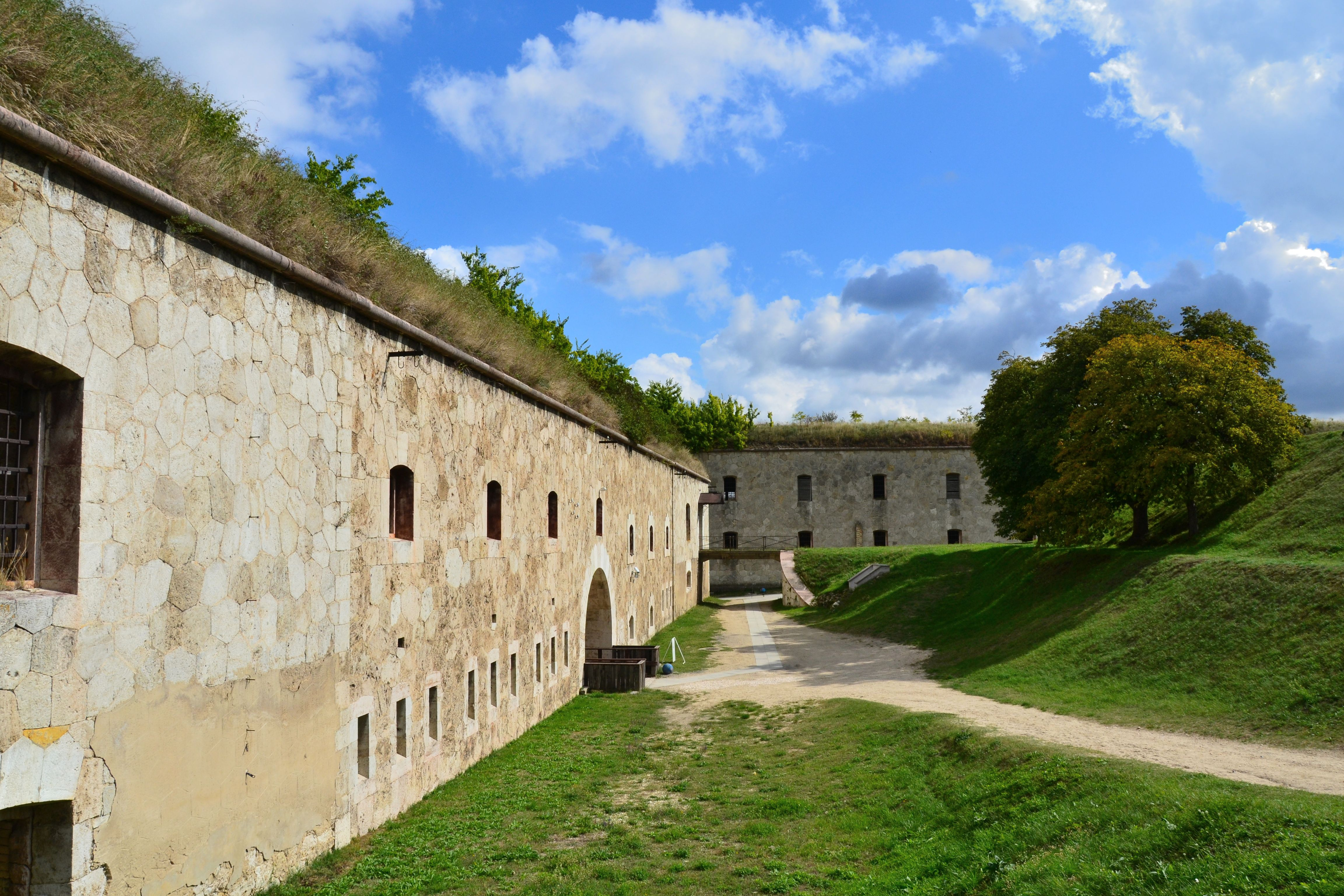 Monostori erőd This is a photo of a monument in Hungary. Identifier: 6306